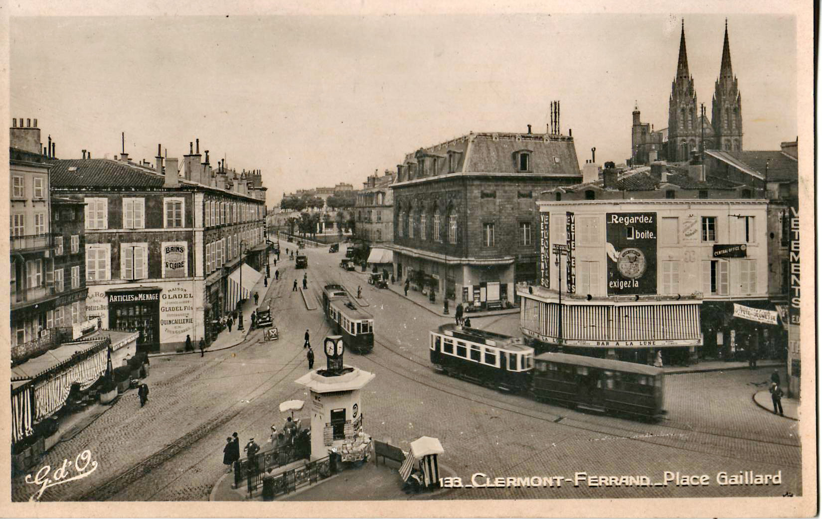 Carte postale ancienne éditée par G d'O n°133 : CLERMONT-FERRAND - Place Gaillard